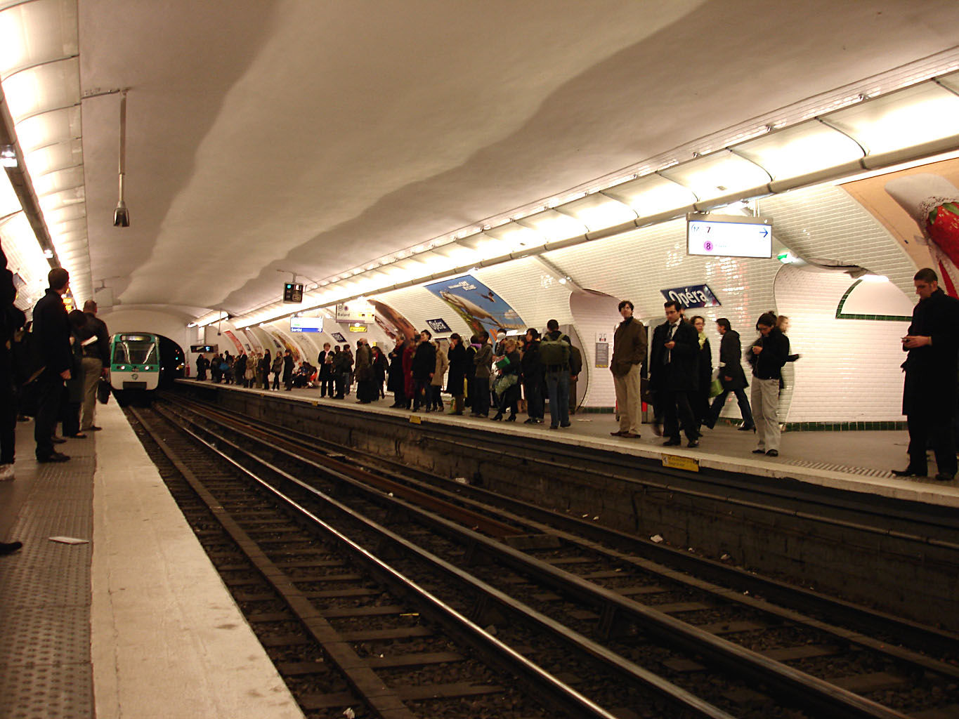 La station Opéra de la ligne 8 du métro de Paris, France